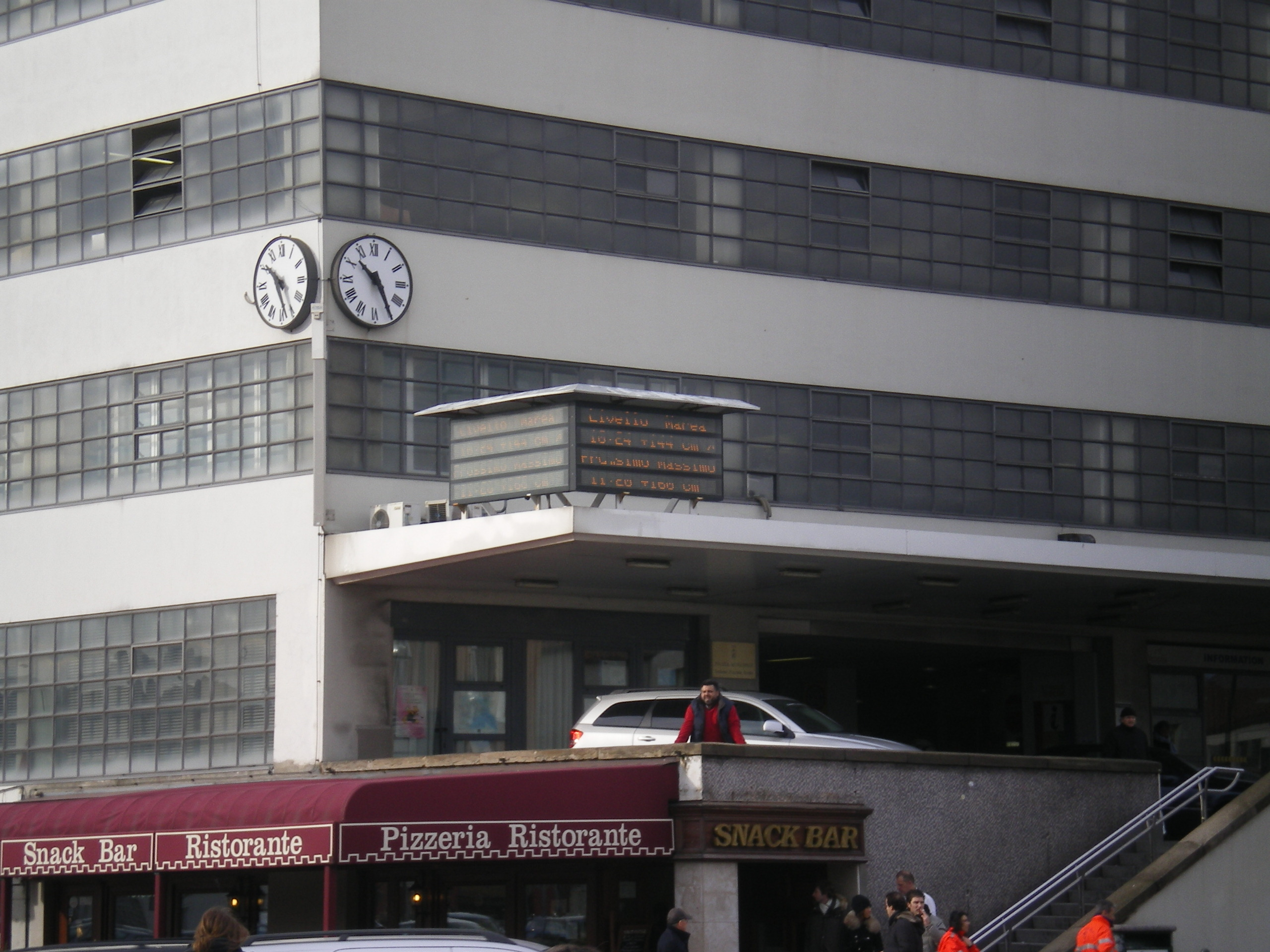 pannello con previsioni di marea a Piazzale Roma